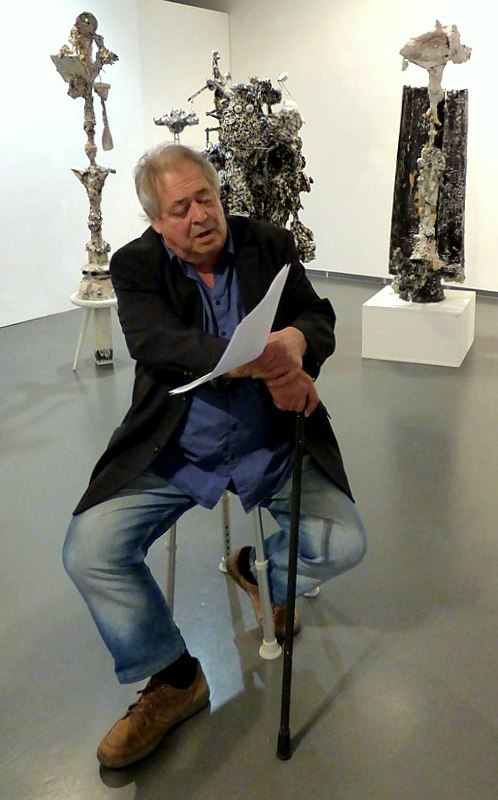 Aufnahme von Hermann Josef Mispelbaum aus übach-Palenberg währedn der Ausstellung im Kulturwerk Aachen im September 2018